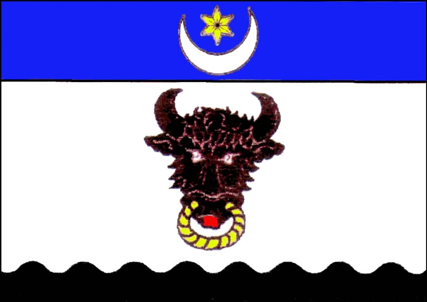 Vlajka obce Černvír